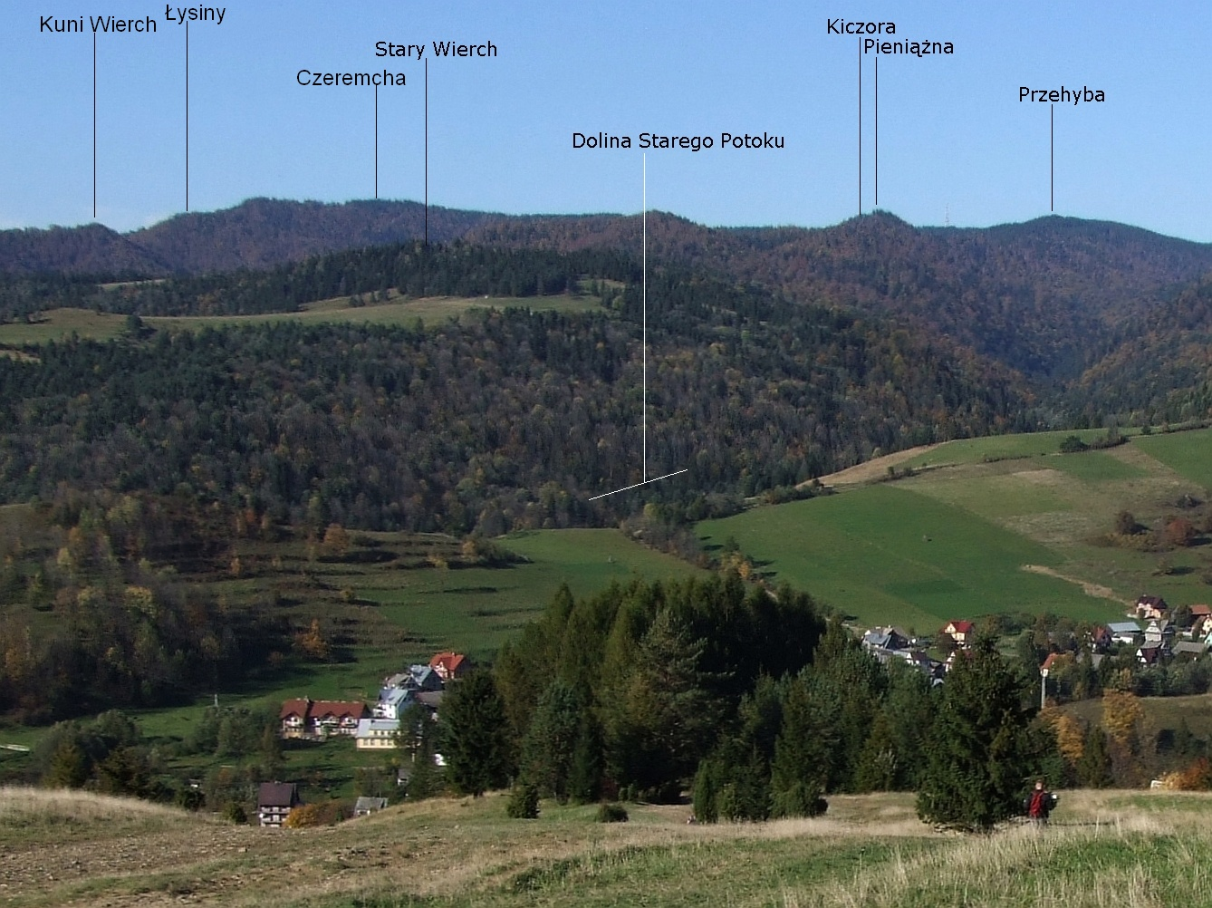 Widok z Jaworek na Beskid Sądecki